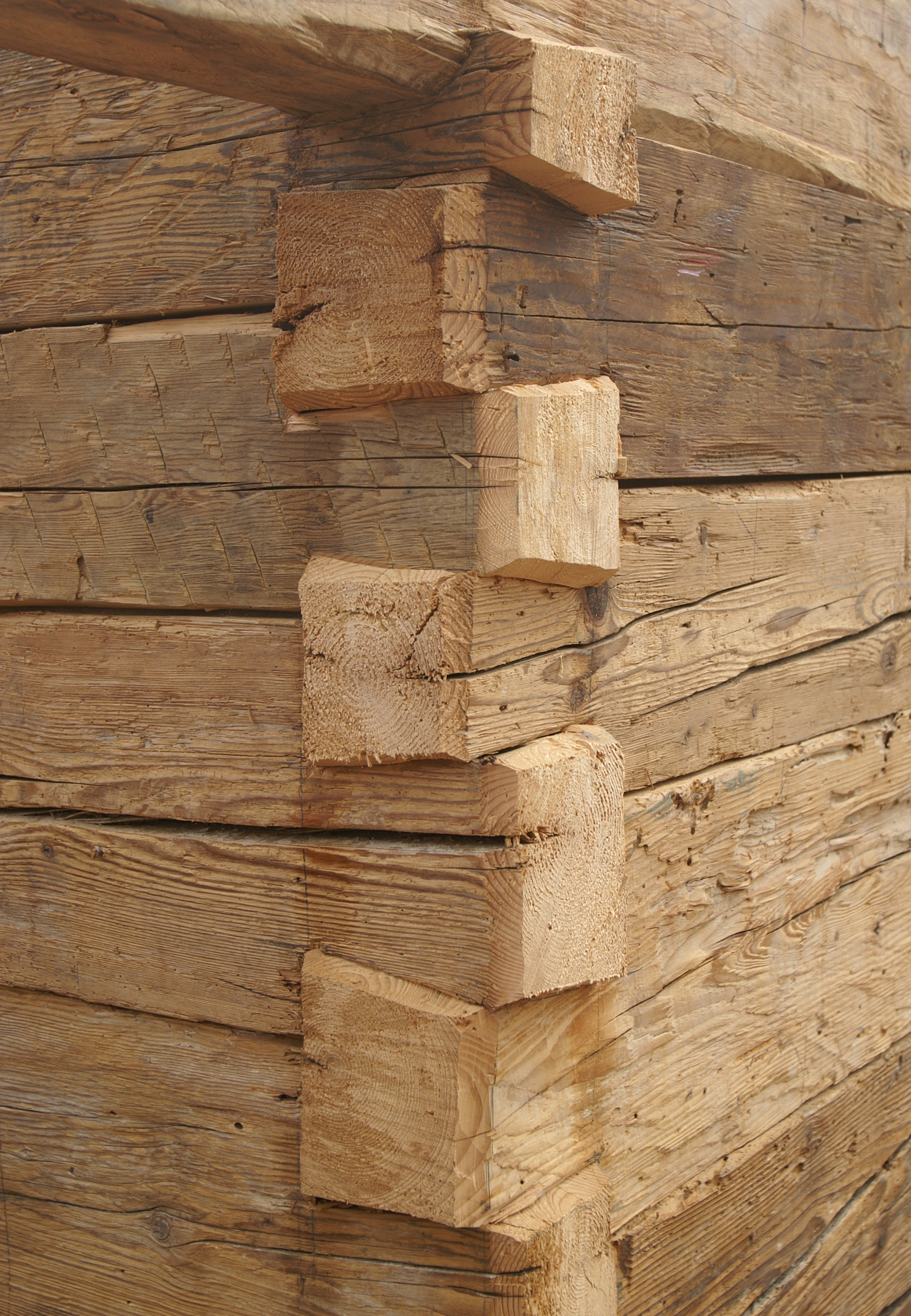 Eckverbindung Schwalbenschwanzverbindung eines Blockhauses im Bregenzerwald.